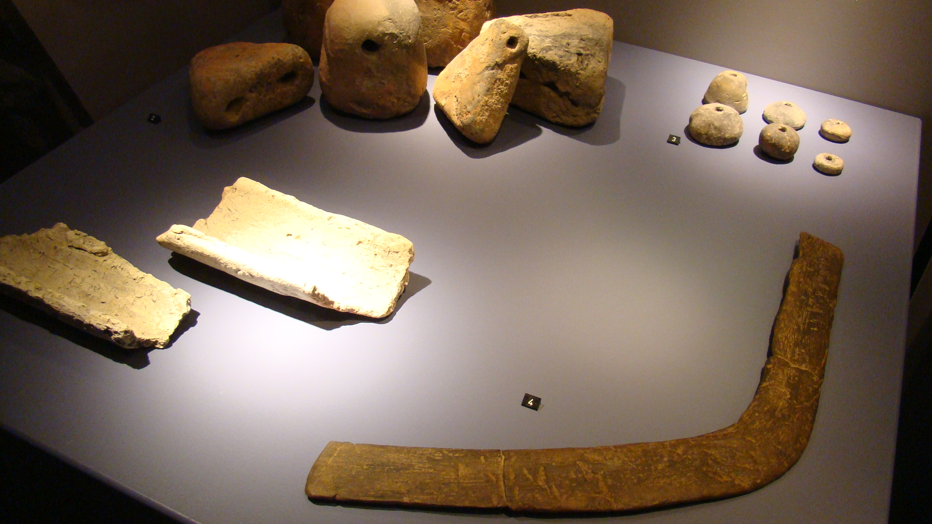 Boemerang (afgietsel) uit 550 voor christus. Gevonden in Velsen. Rijksmuseum van Oudheden, Leiden. Boomerang (cast) from 550 BC. Found in Velsen. National Museum of Antiquities, Leiden.